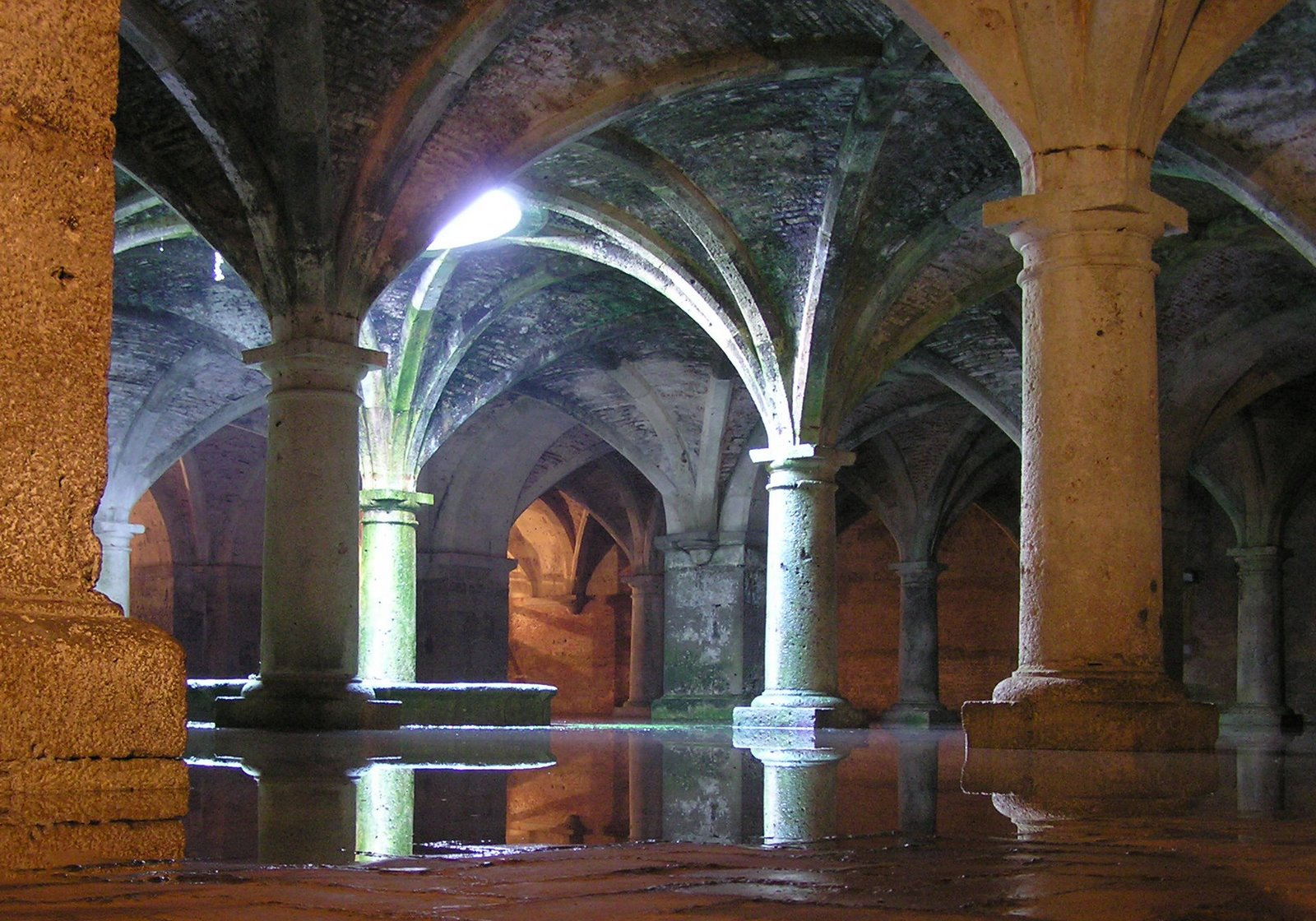 El Jadida , cisterna portoghese